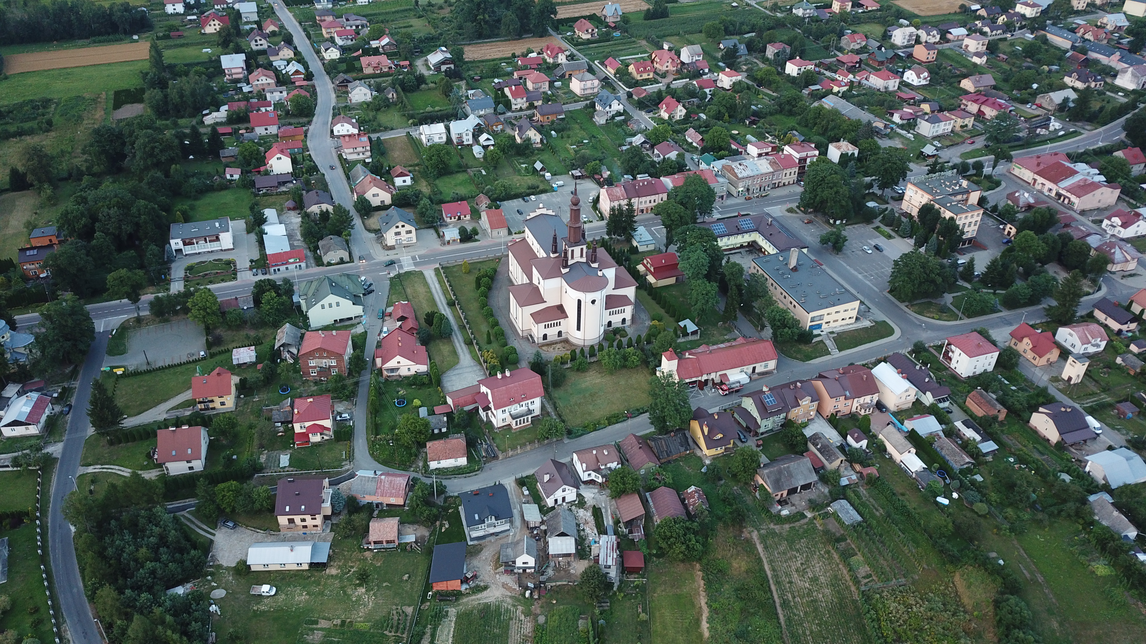 Dubiecko z lotu ptaka (z drona), w centrum kościół